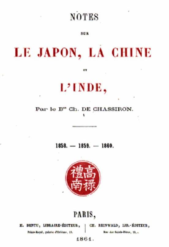 Notes sur le Japon la Chine et l'Inde, par le baron Charles Gustave Martin de Chassiron.